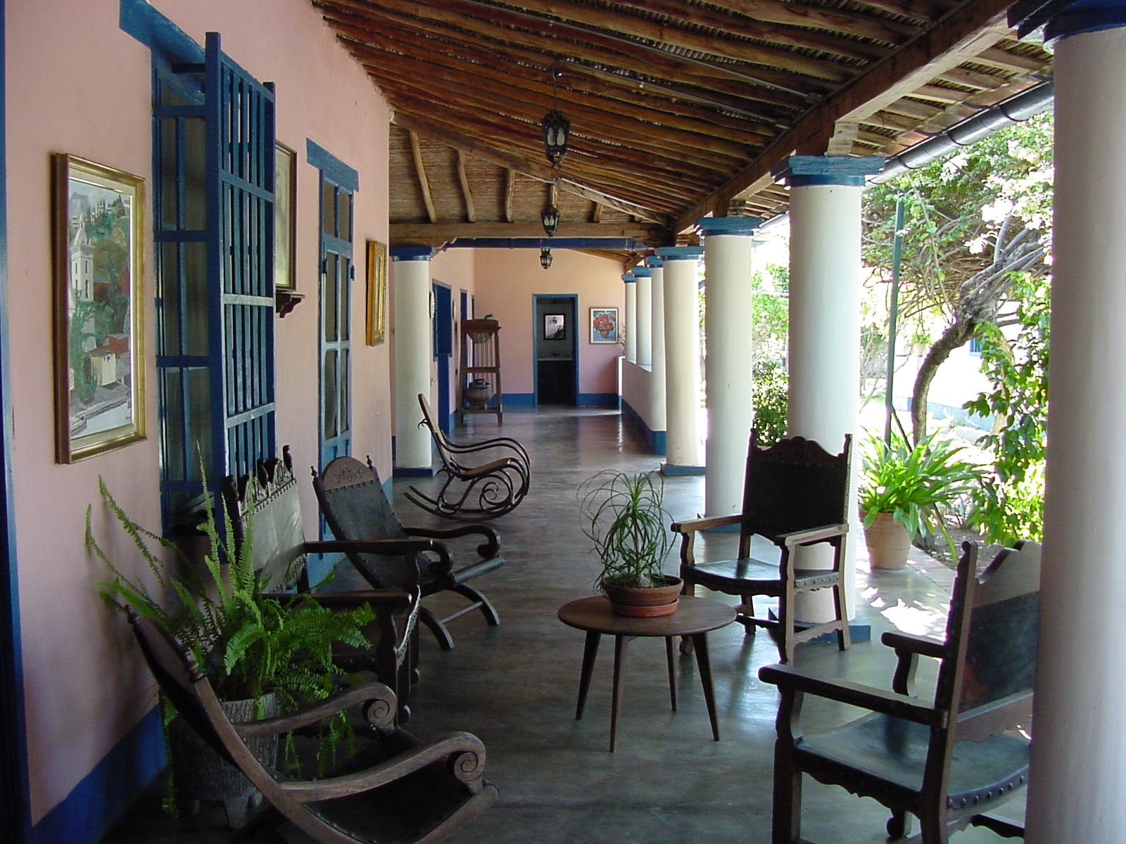 Corredor de la casa de la Hacienda Mozanga en 1998.